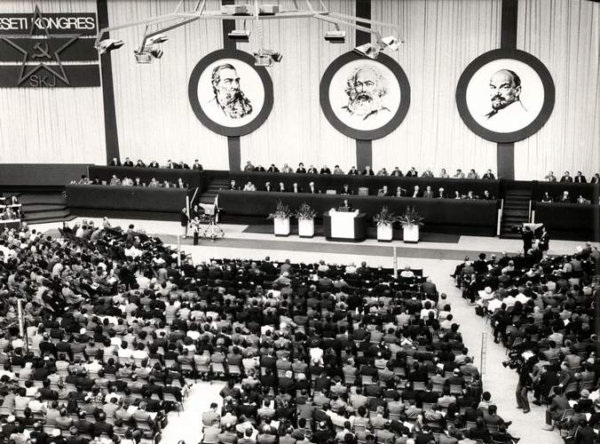 Srpski (latinica): Deseti kongres SKJ u Beogradu 1974. godine